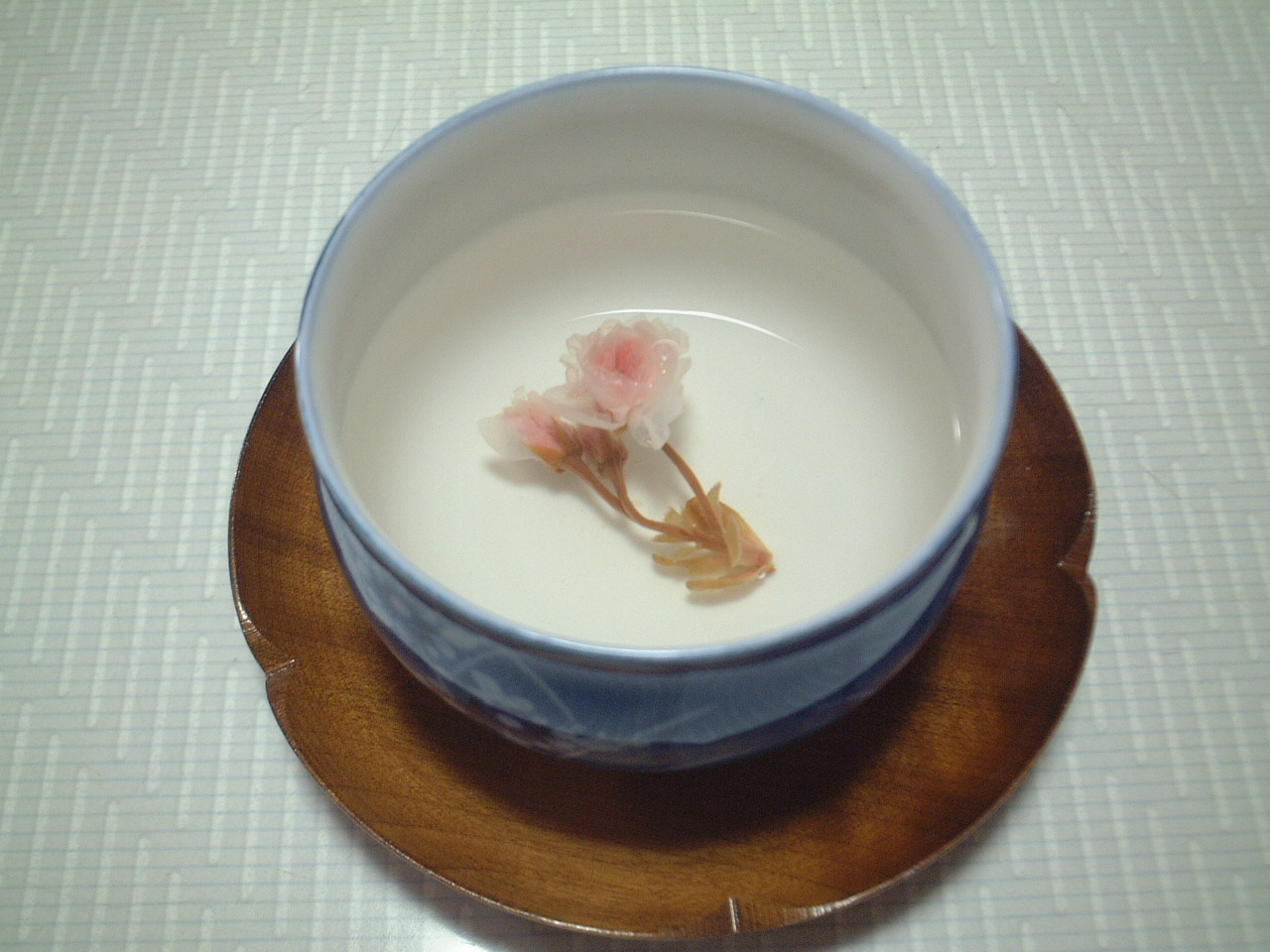 さくら湯。塩漬けの桜の花を、湯に入れて飲む。味を楽しむと言うよりも、季節感を味わう縁起物の性格が強い。Suguri Fによる撮影。